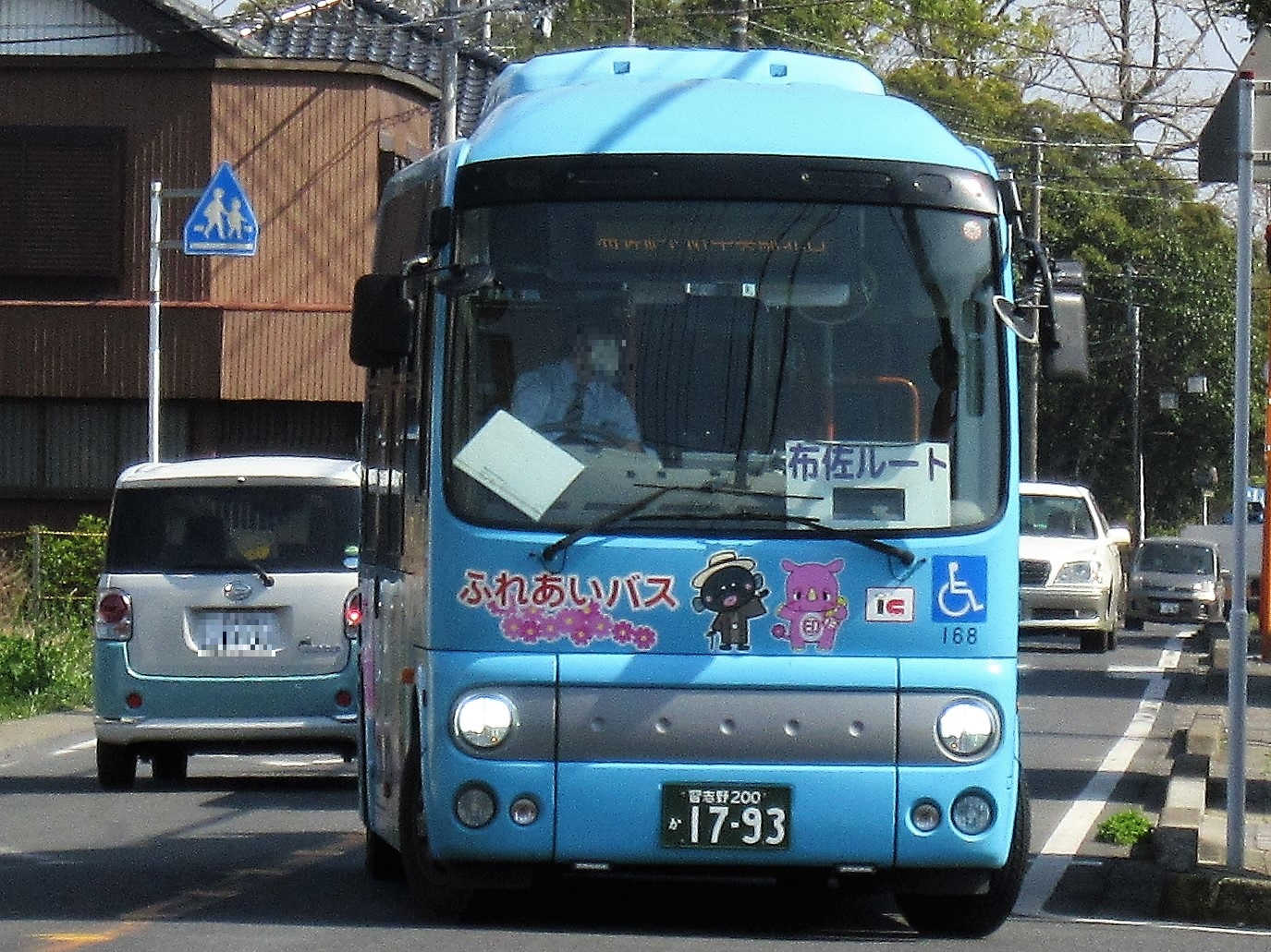 印西市ふれあいバス（布佐ルート） Canon PowerShot A2200